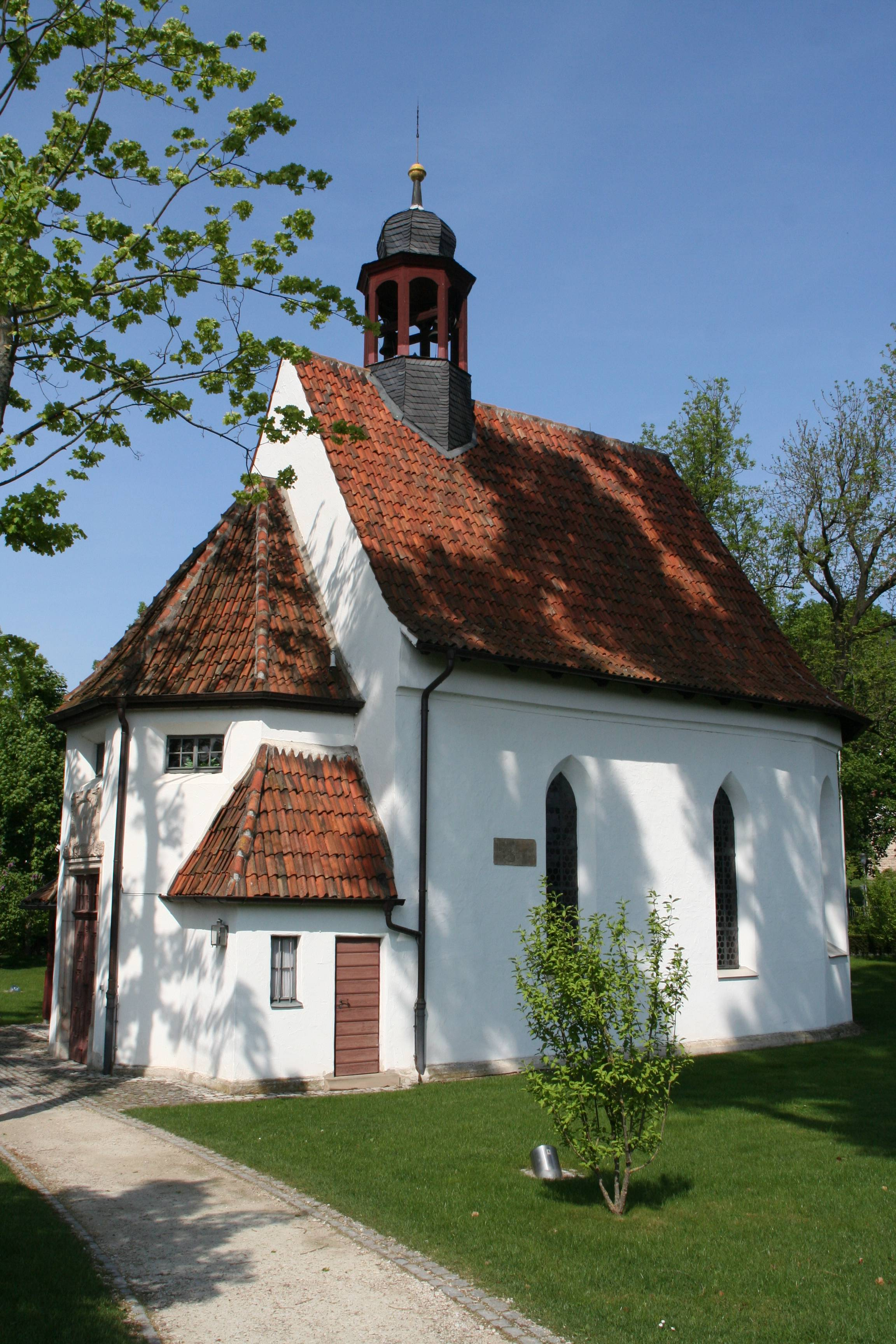 Coburg, Nikolauskapelle